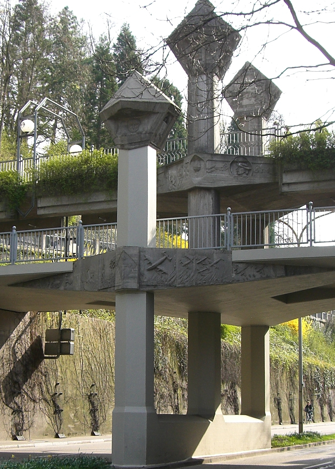 Schlossbergsteg, Fußgängerbrücke und Parkhausein- und Ausfahrt über den Schlossbergring. Gebaut im Jahr 1979. Verziert mit Betonreliefs des Künstlers Emil Wachter mit Motiven zur Geschichte der Zähringer und zur Freiburger Stadtgeschichte. Bauliche Ausführung durch Architekt Diel, Freiburger Kommunalbauten. Teile des Betonreliefs nehmen Bezug auf die Bombardierung Freiburgs am 27.11.1944.